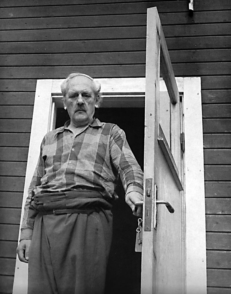 Gustav Hedenvind-Eriksson på sin gård i Kyrknäset,m Hothagen, Jämtland